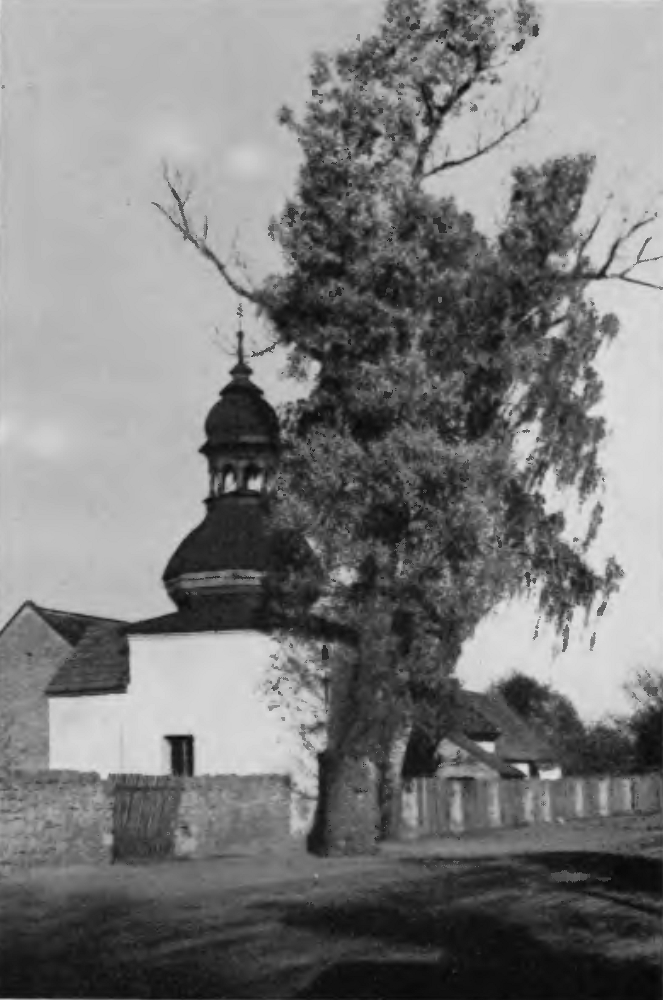 Kapelle in Kupferberg im Kreis Oppeln.